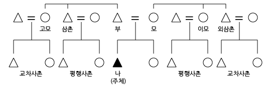 An anthropology chart showing the relations between family members.